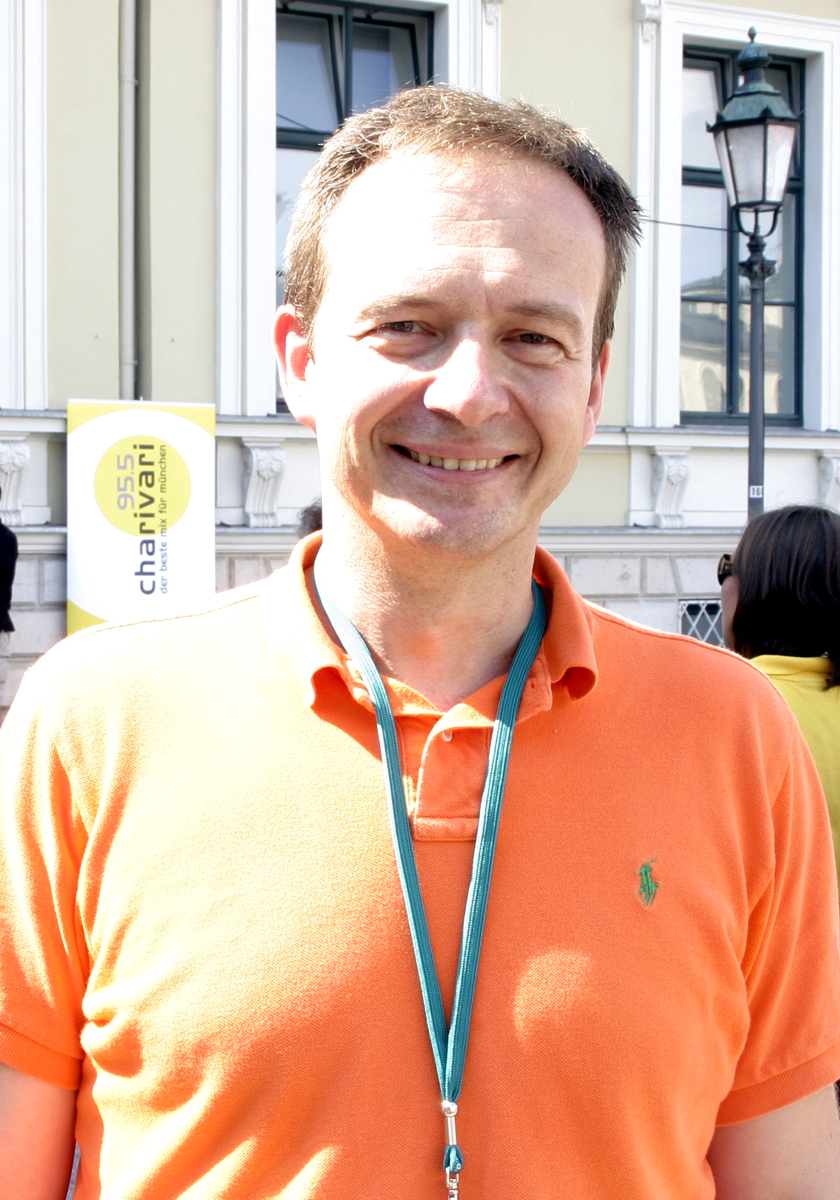 Bernd Weiß, bayerischer Politiker (CSU) und Mitglied des Bayerischen Landtags. Hier am 1. August 2009 noch als Staatssekretär im Staatsministerium des Innern (vor dem Bayerischen Innenministerium).